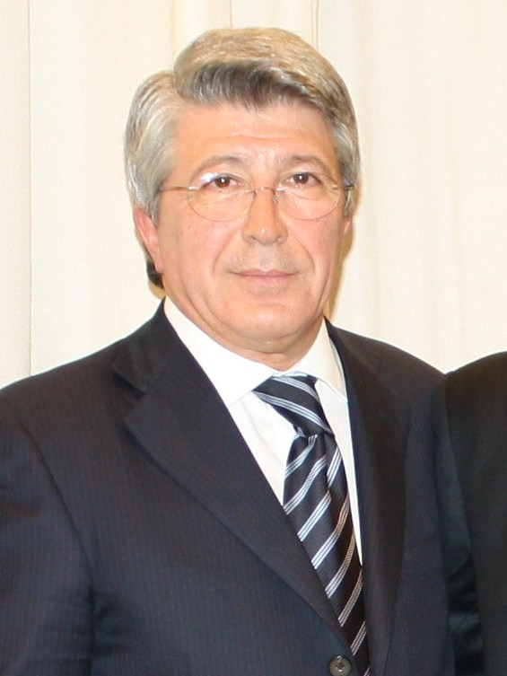 Enrique Cerezo tras impartir una conferencia en el Colegio Mayor Elías Ahúja de Madrid.